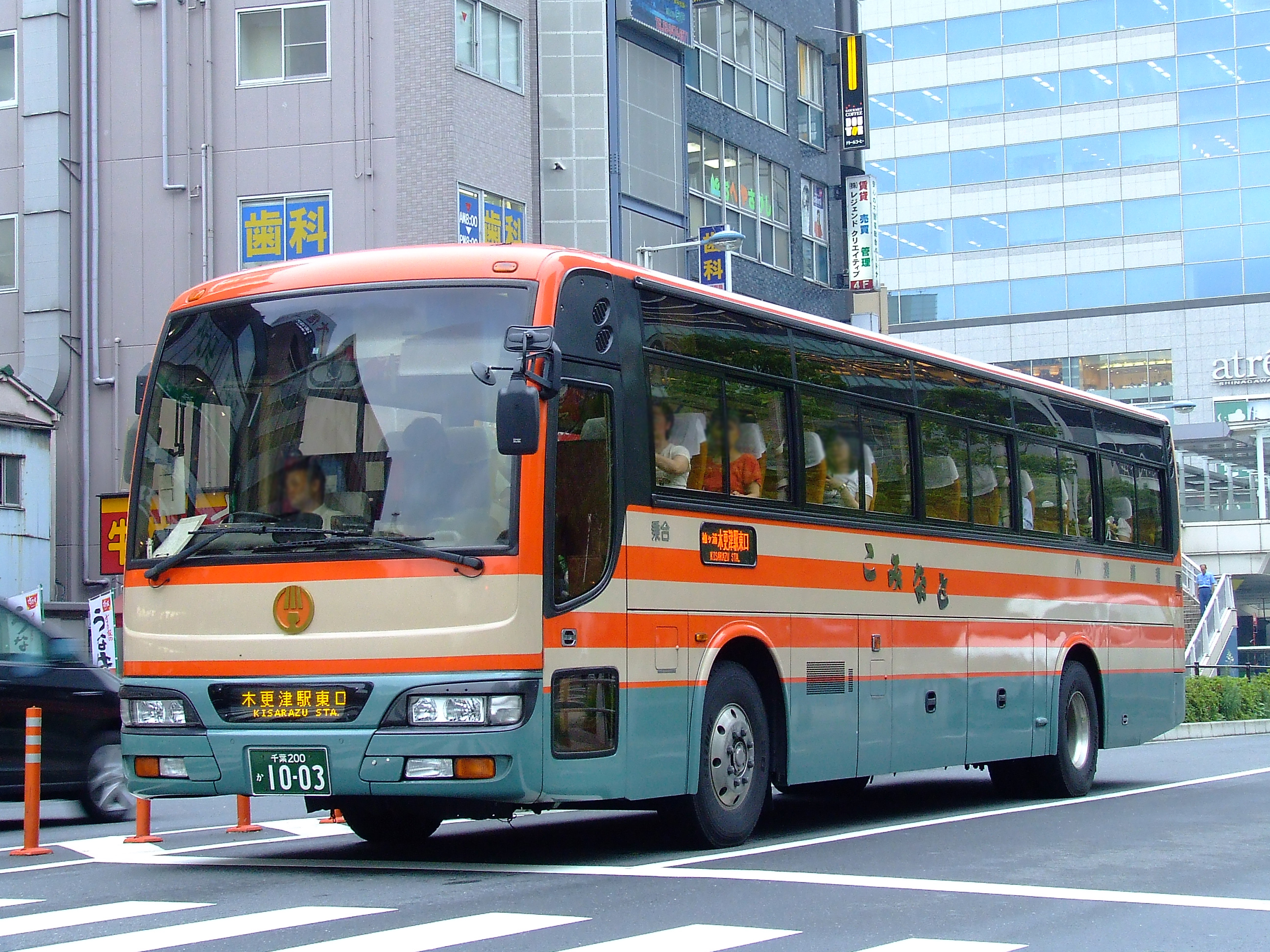 小湊鉄道高速バス品川～木更津線 品川駅東口付近にて